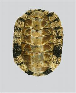 Acanthopleura vaillantii